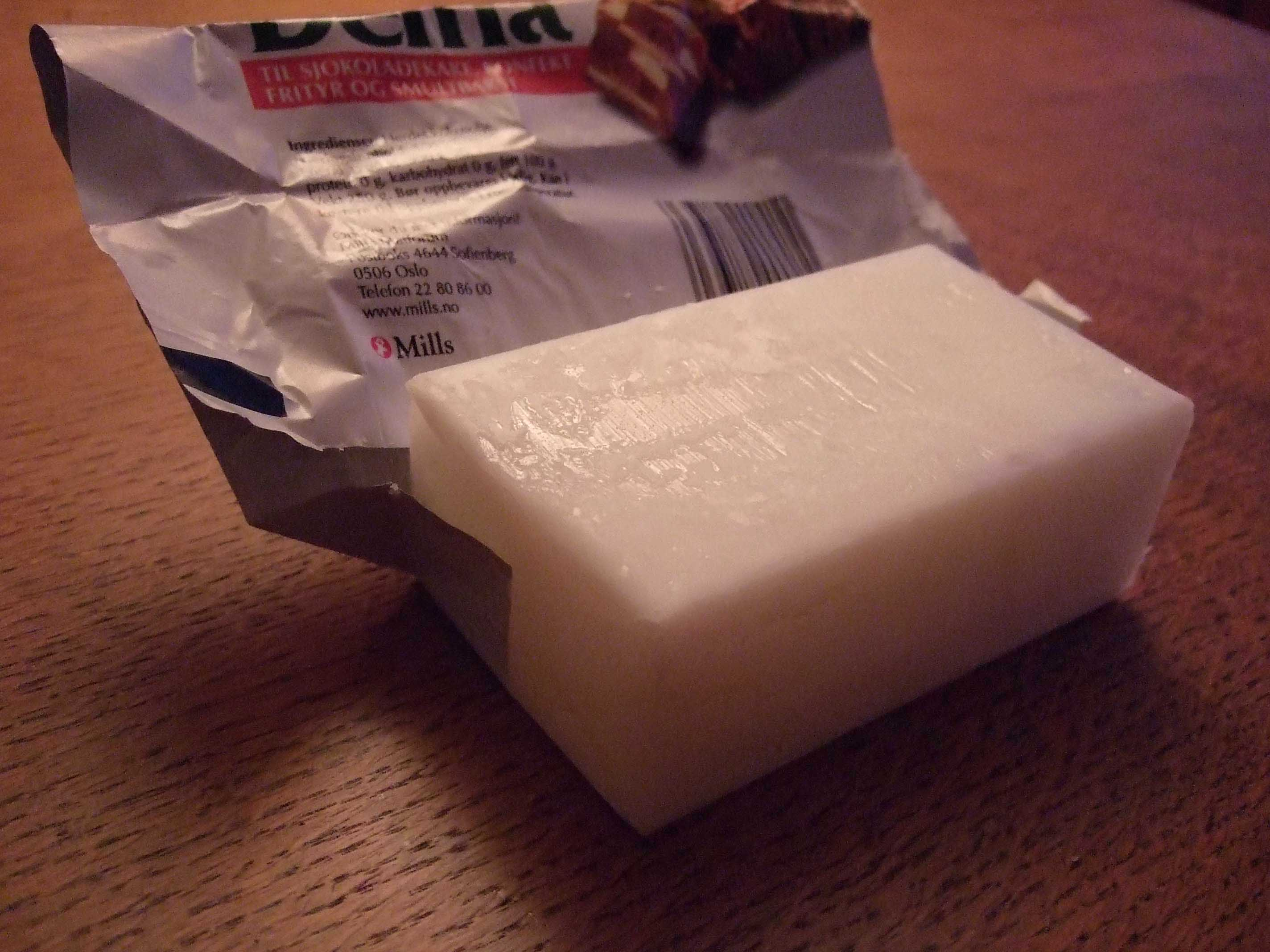 Coconut-fat - saturated coconut oil - 100% fat.